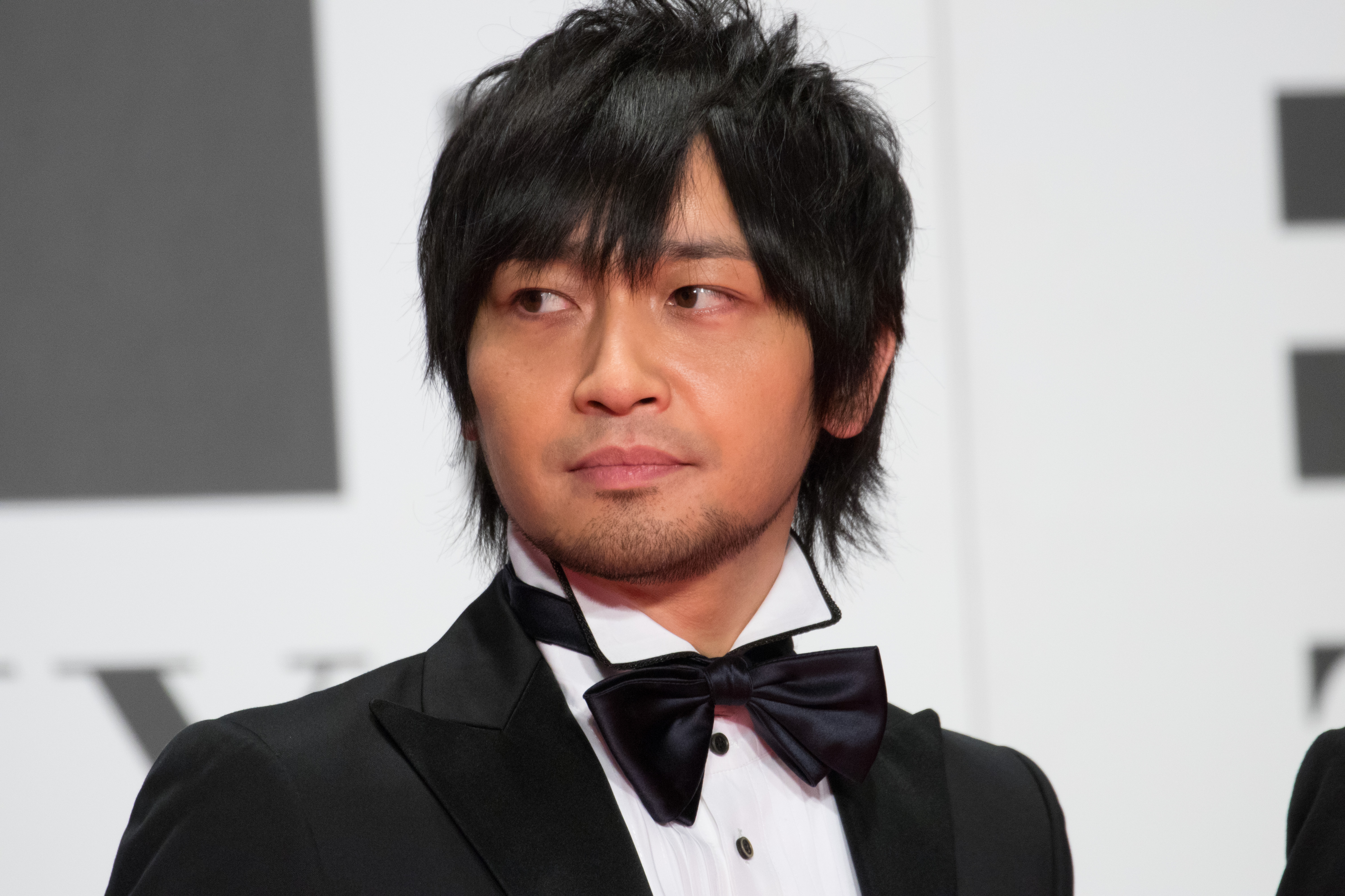 第29回 東京国際映画祭 オープニングセレモニー 中村悠一 (虐殺器官)